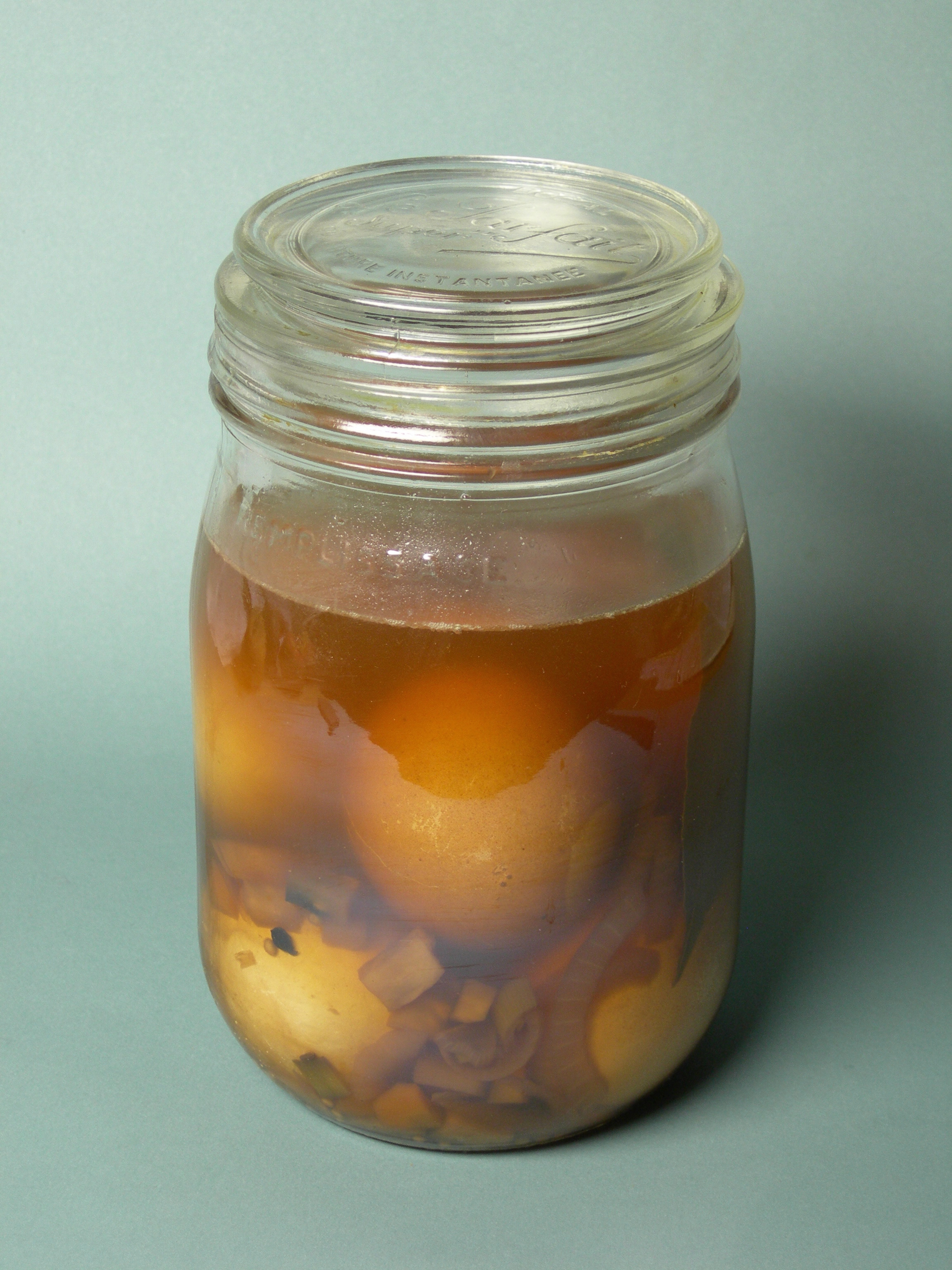 Soleier in Würzlake eingelegt